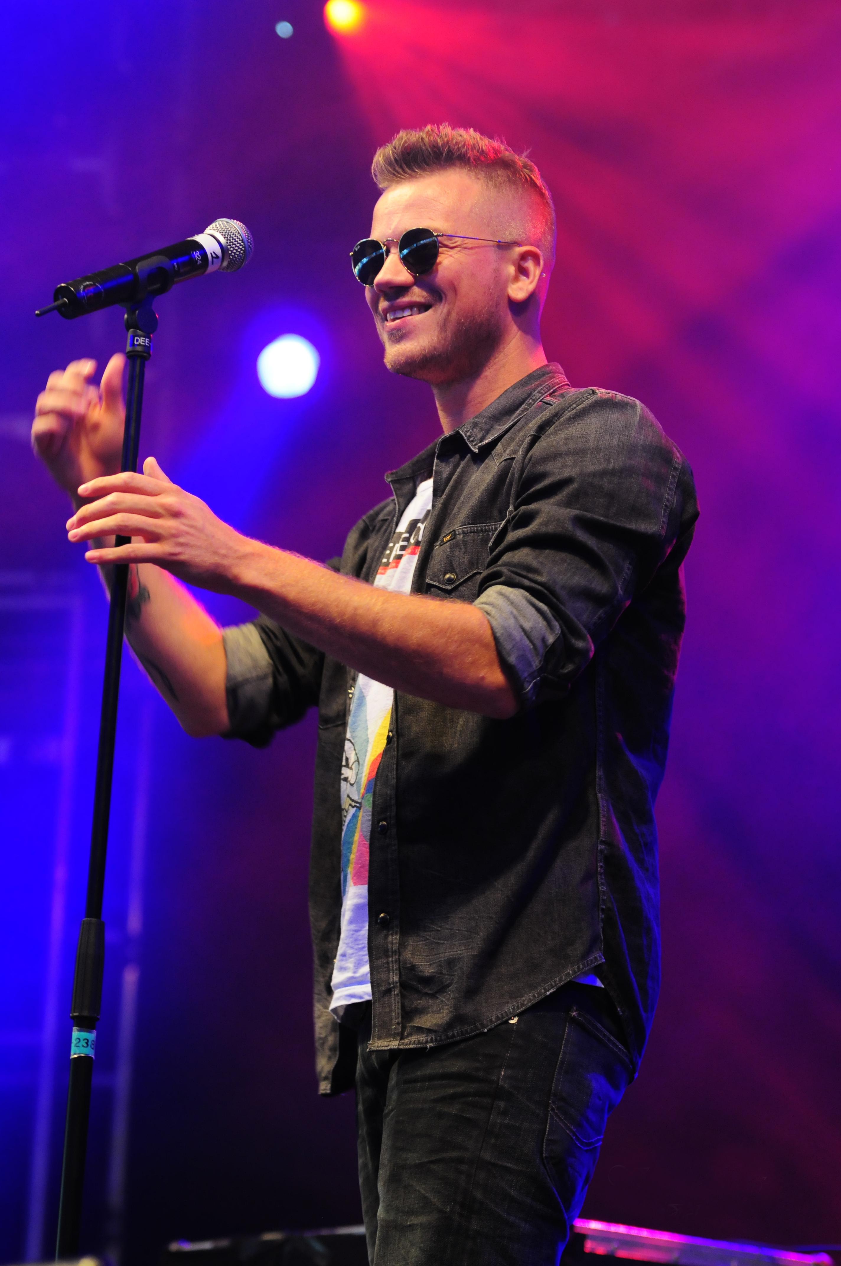 Gers Pardoel, Nederlands zanger